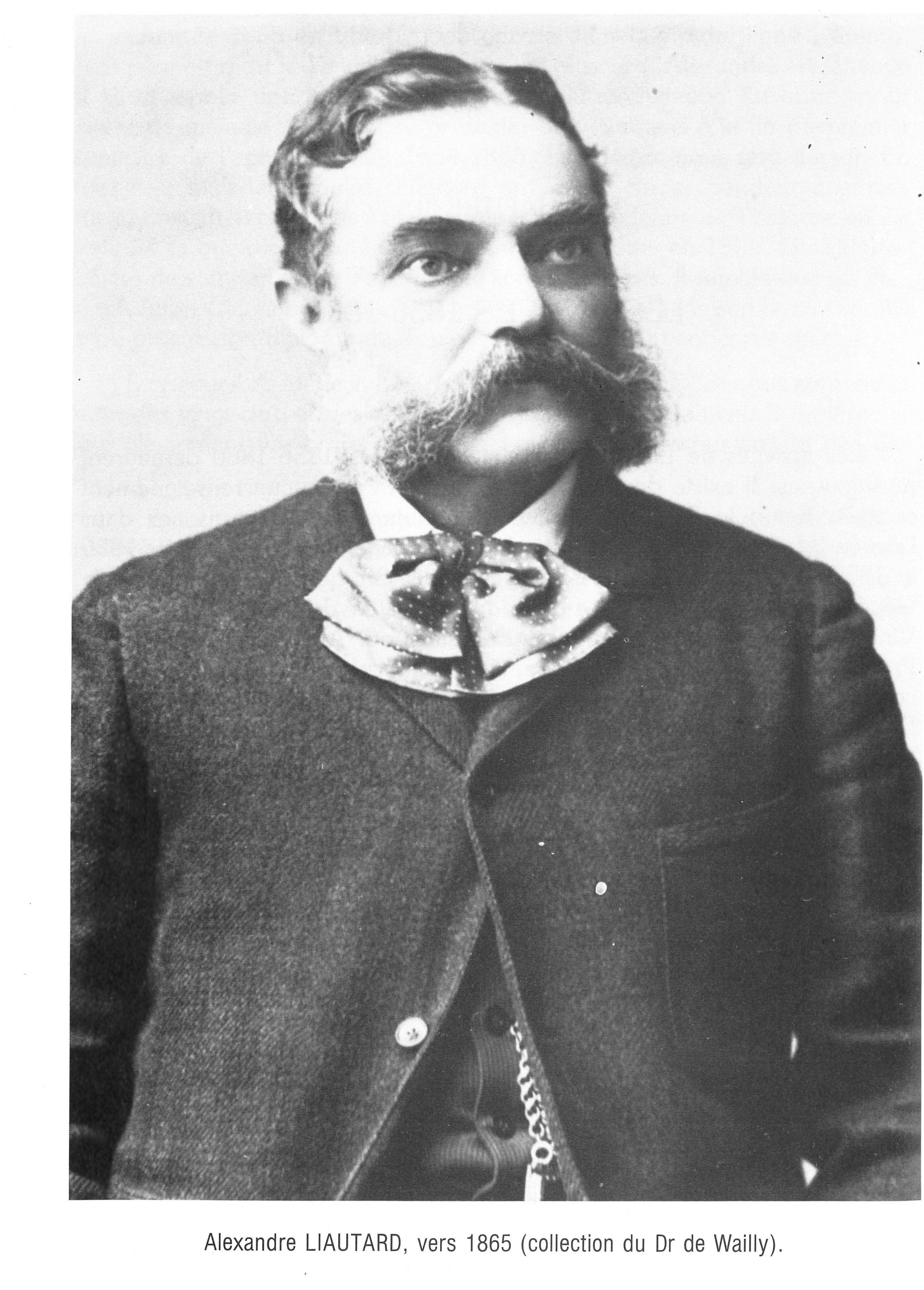 Alexandre Liautard, vétérinaire français (1835-1918) ayant exercé à New York de 1860 à 1900. Fondateur du New York American Veterinay College, de la United States Medical Vetrinary Association et de l'American Veterinary Review ancêtre de l'actuel JAVMA